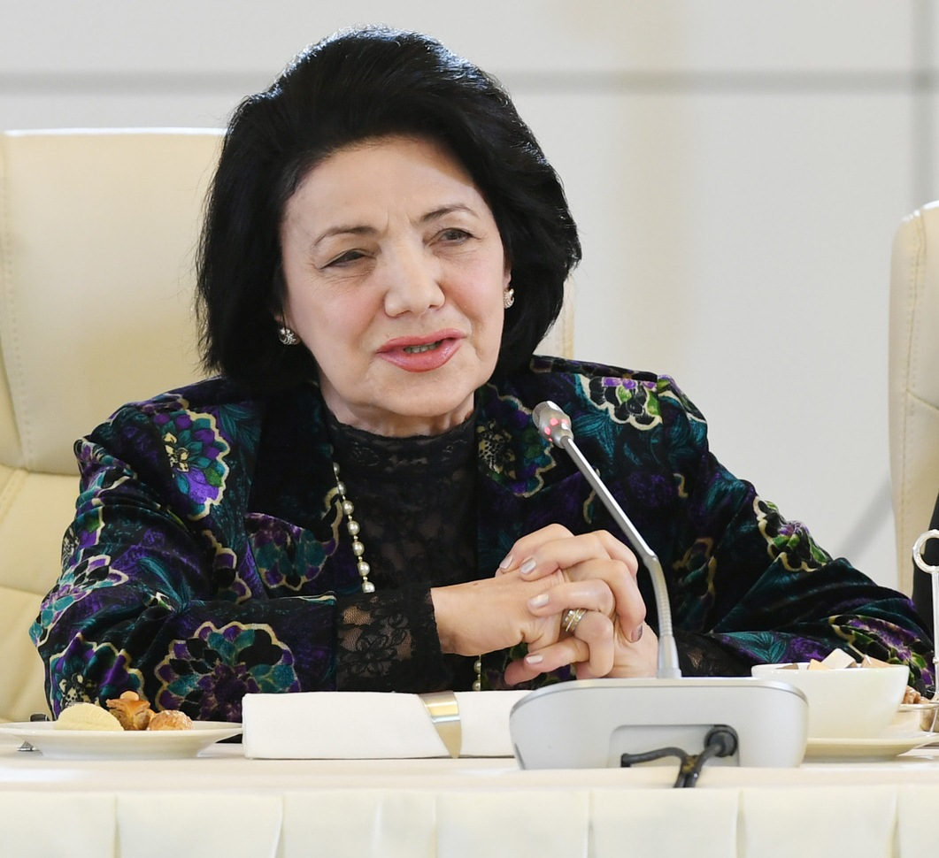 Azərbaycanın mədəniyyət və incəsənət xadimlərinin bir qrupunun Azərbaycan Respublikasının Prezidenti İlham Əliyev və birinci xanım Mehriban Əliyeva ilə görüşündə şəkilmiş foto